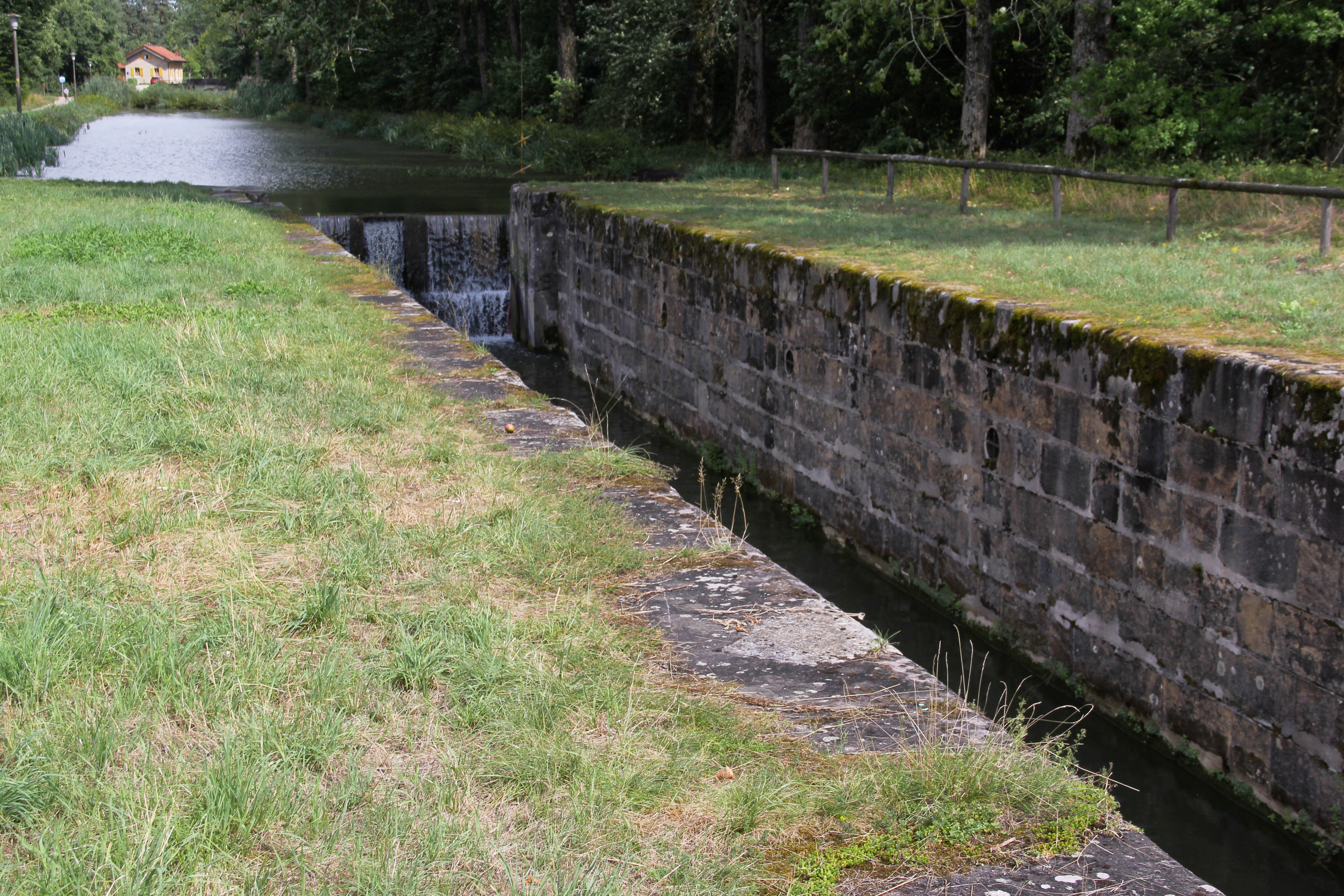 Schleuse 38, Ludwig-Donau-Main-Kanal